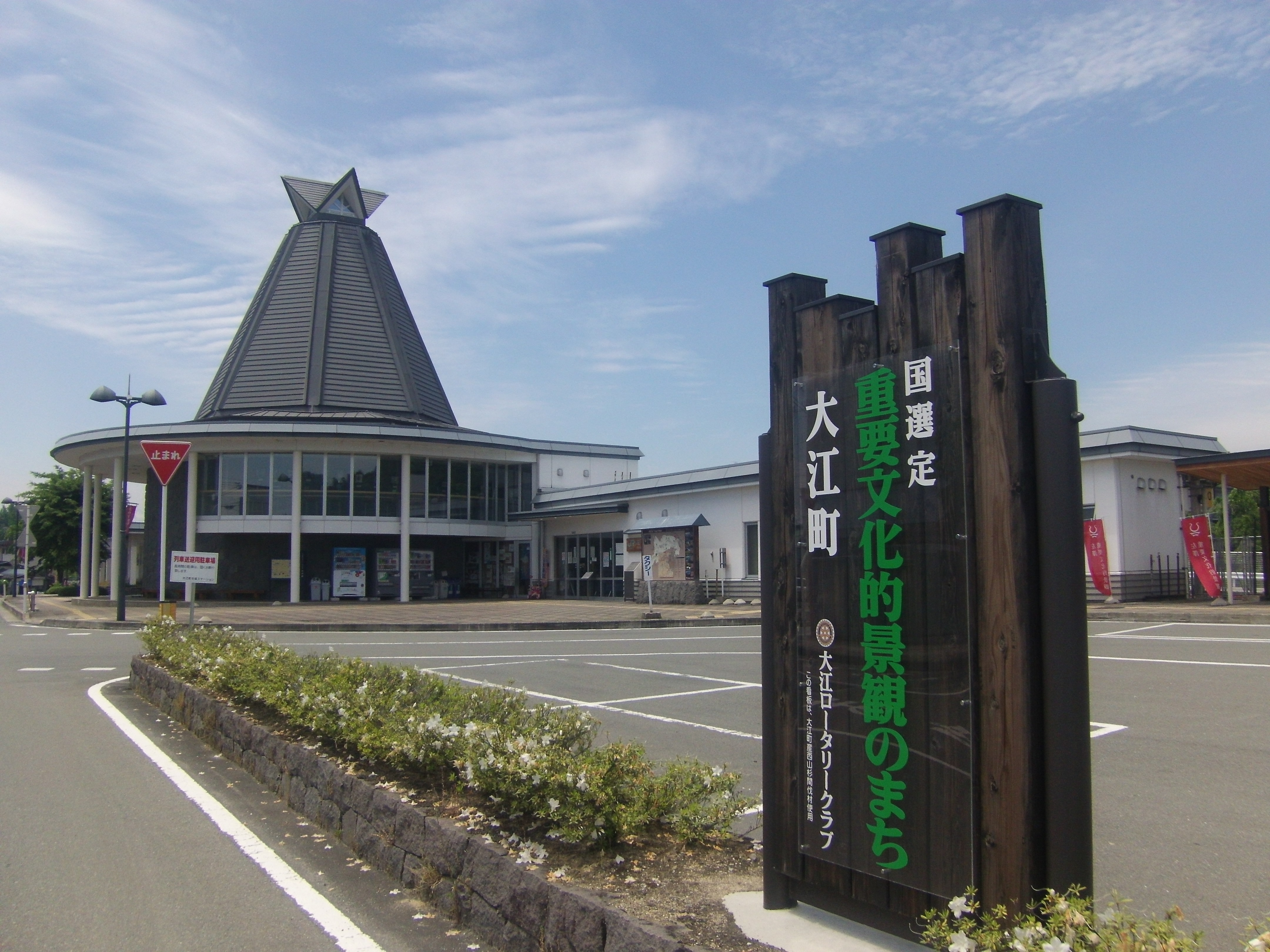 重文景「最上川の流通・往来及び左沢町場の景観」：左沢駅前の看板